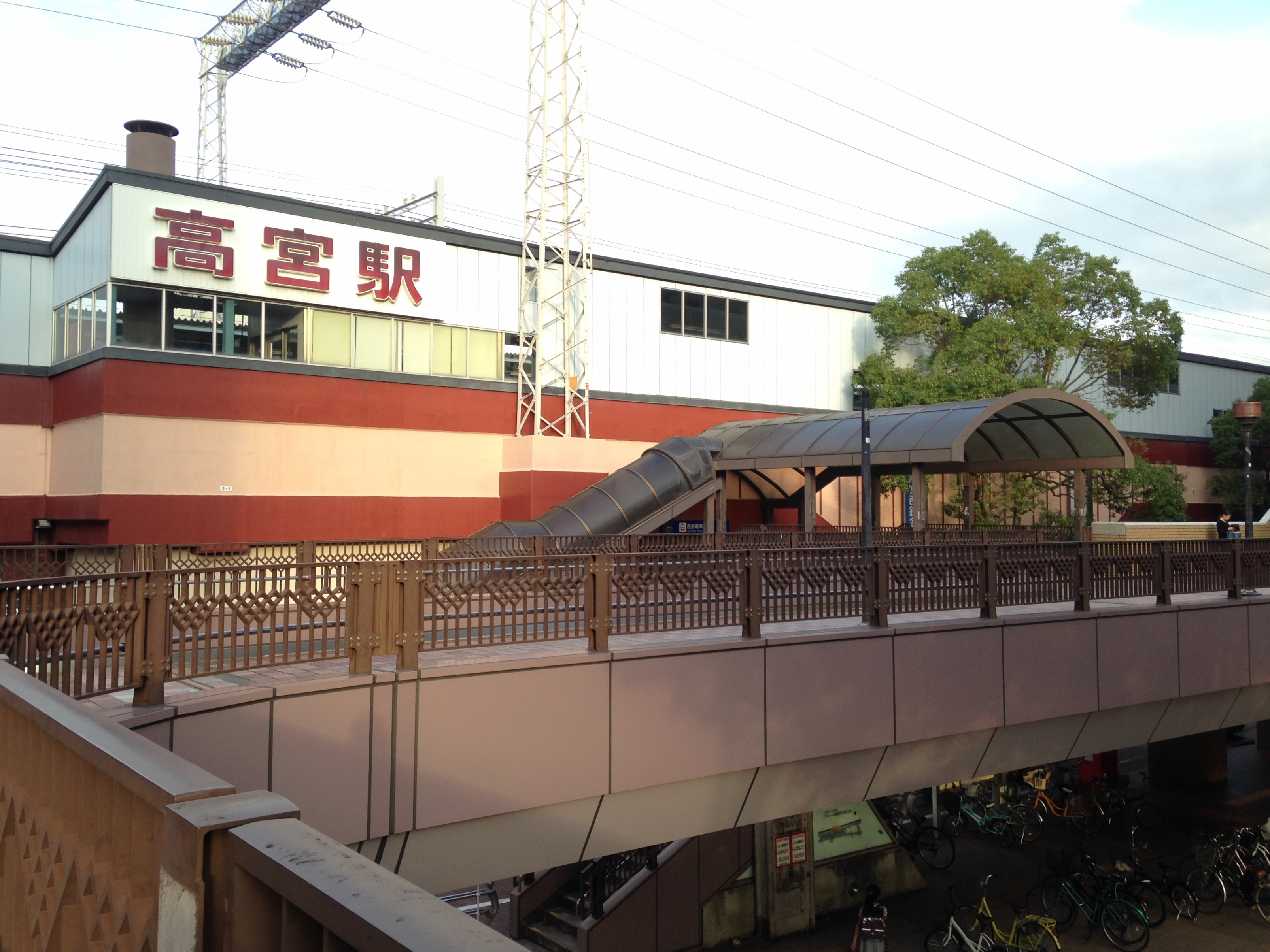 高宮駅駅舎